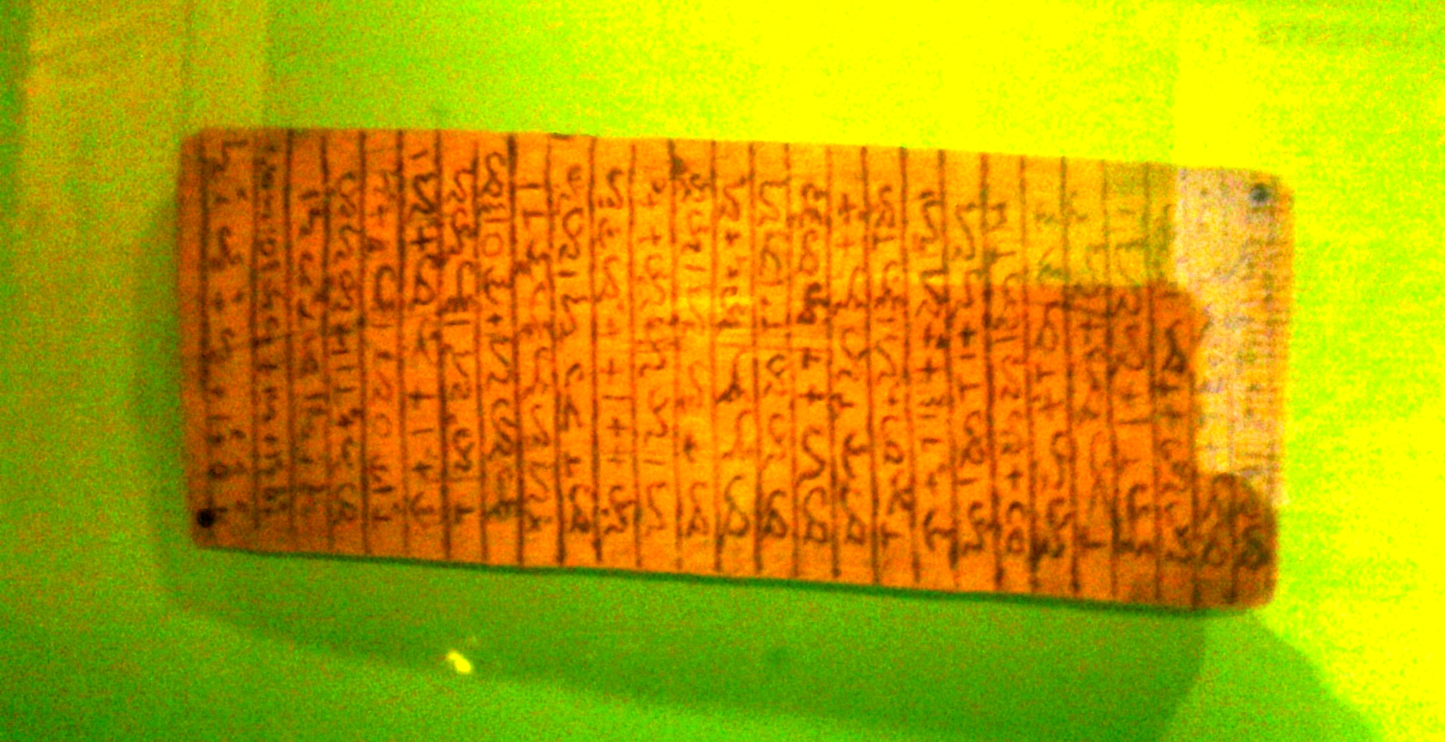 Bikol Central: sinurat kalingking